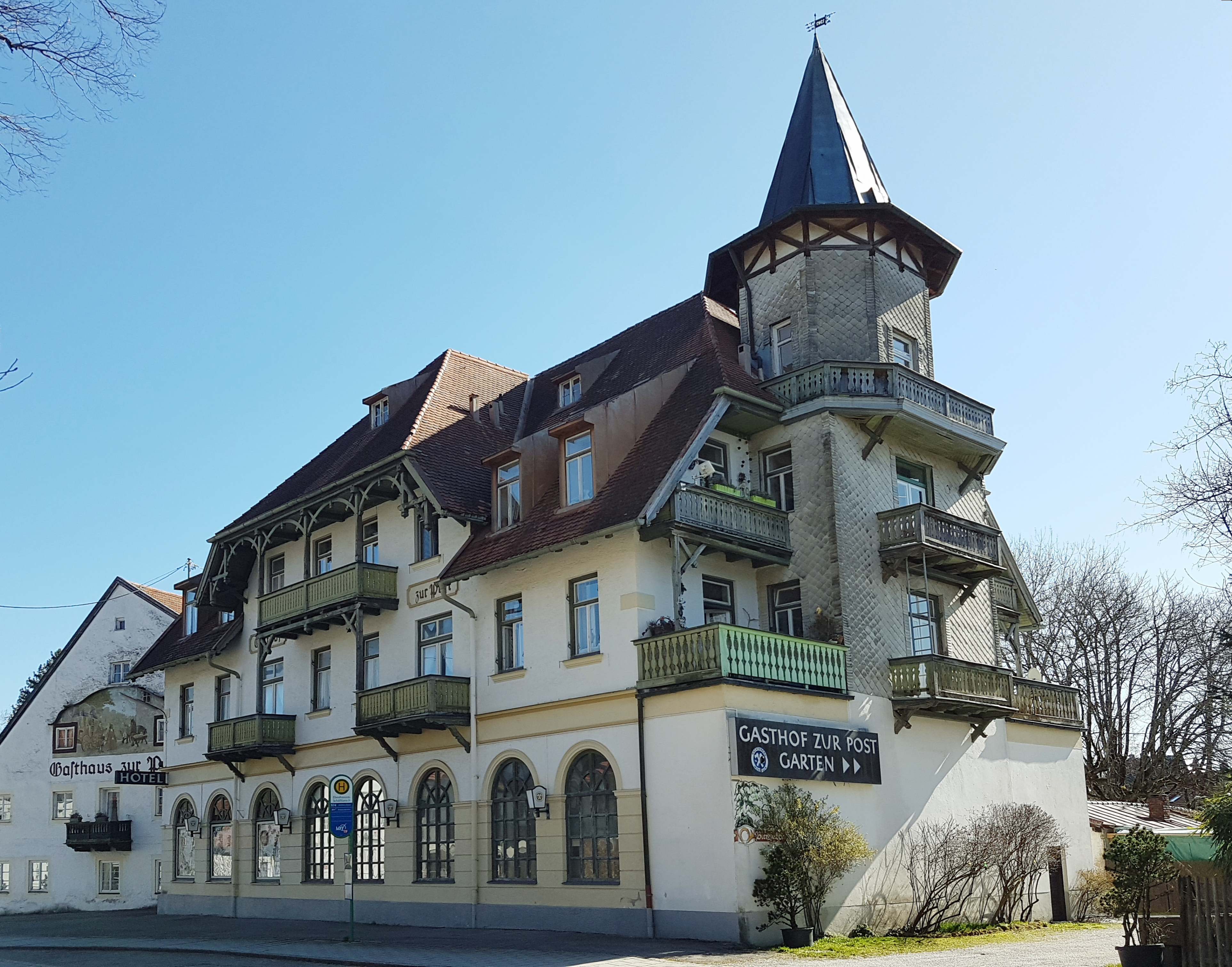 Gasthof zur Post (Ebenhausen)